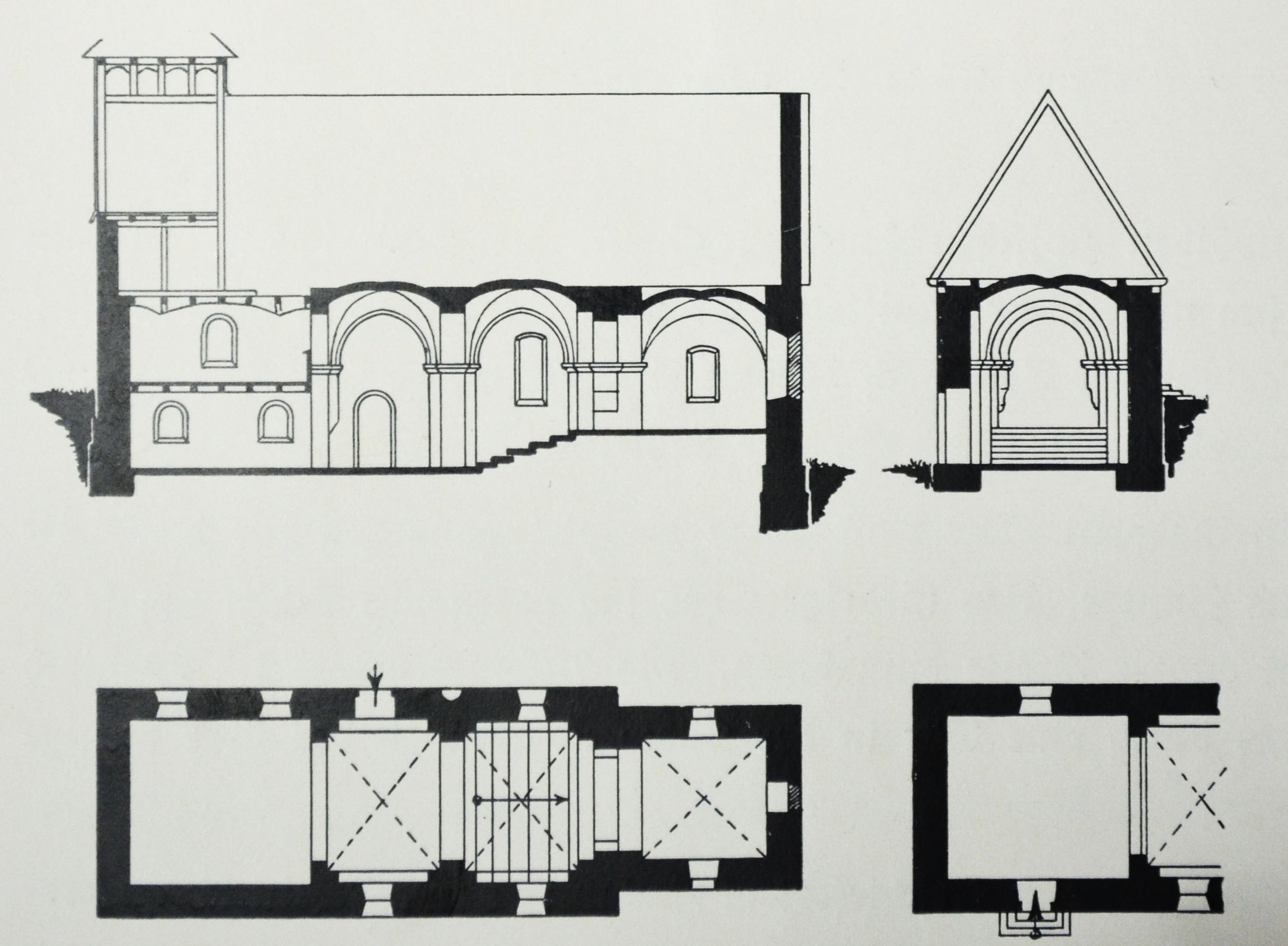 Beringhausen Grundrisse und Schnitte der 1922 abgerissenen Kirche, nach Zeichnungen